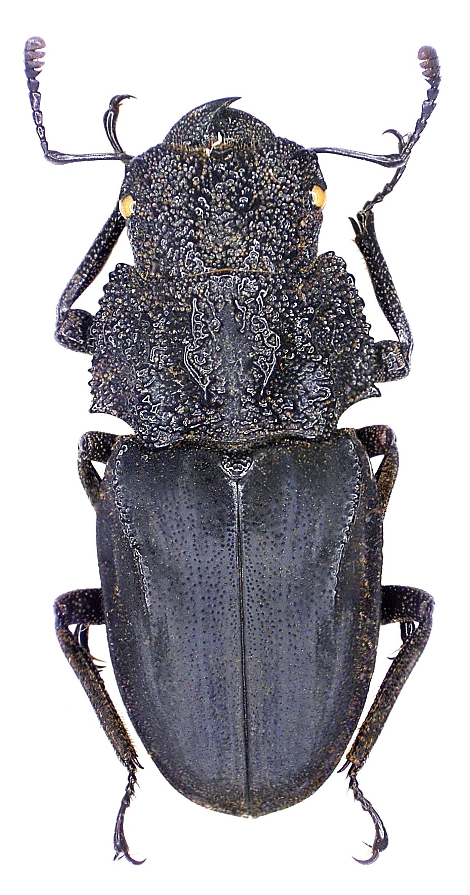 Familie: Lucanidae Grösse: 24-30 mm Verbreitung: Kolumbien, Panama Foto: U.Schmidt, 2006